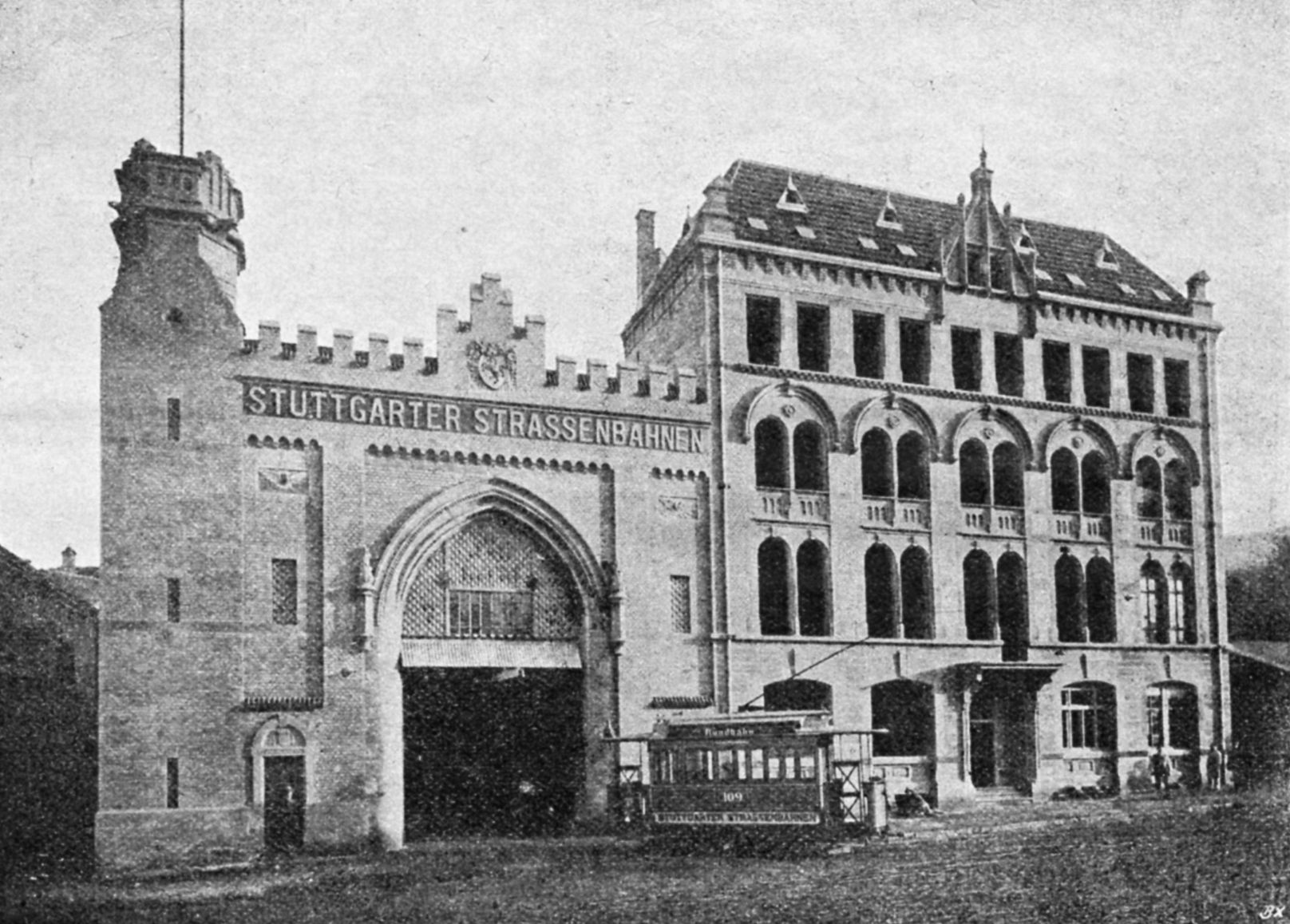 Stuttgarter Straßenbahnen; Depot am Marienplatz